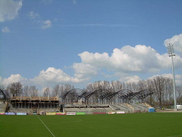 Modernizacja stadionu miejskiego w Łomży